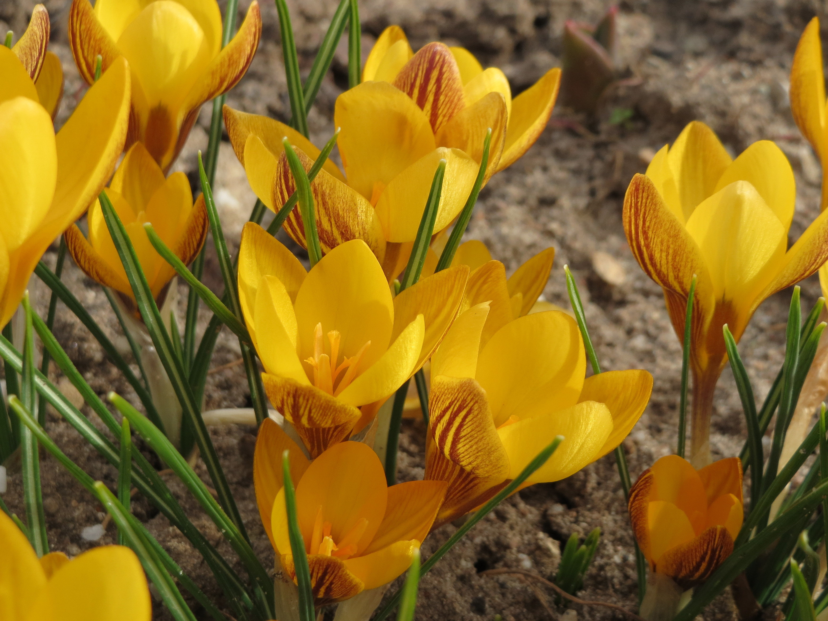 Kleiner Krokus (Crocus chrysanthus) in Hockenheim